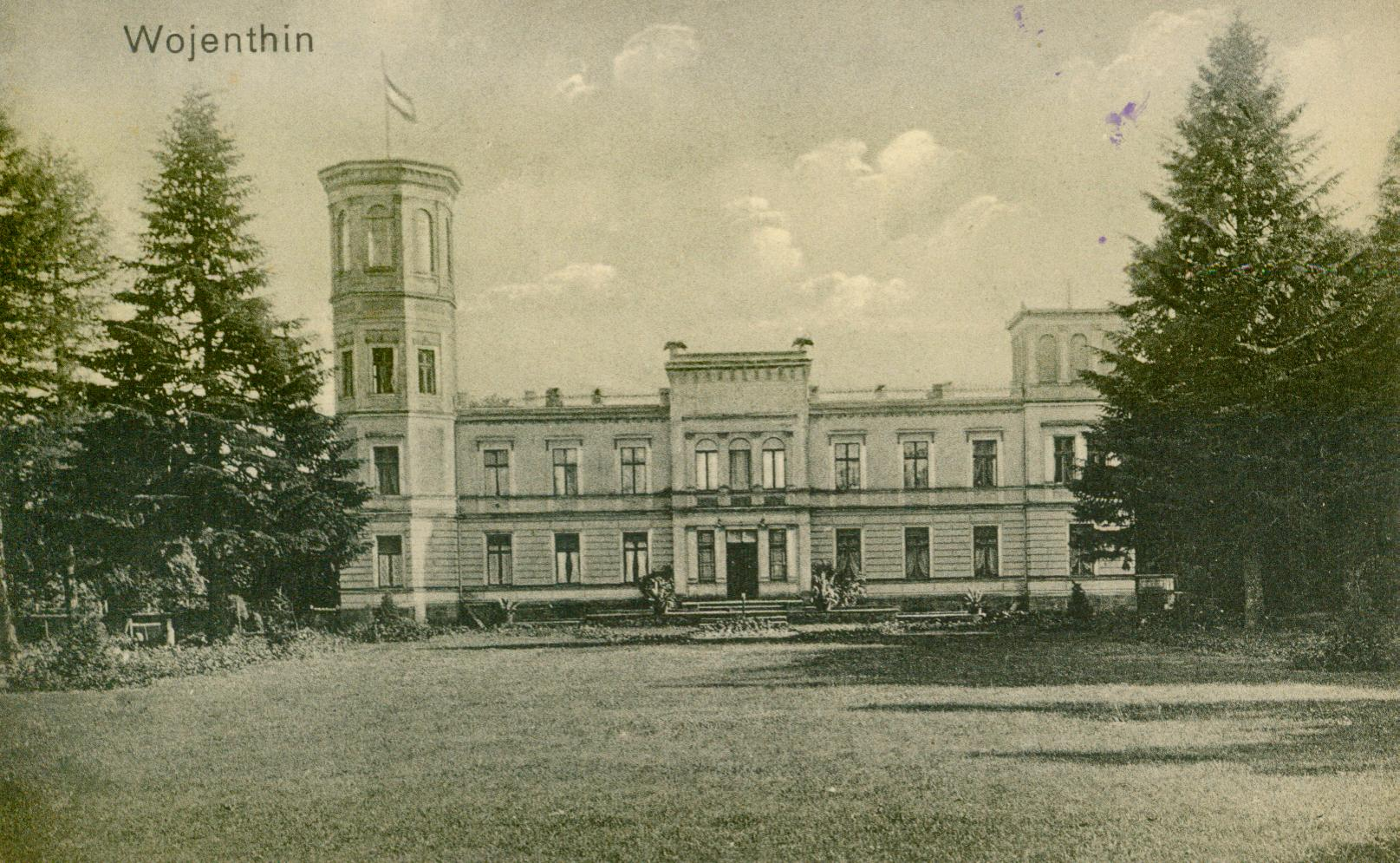 Schloss Wojenthin, Pommern